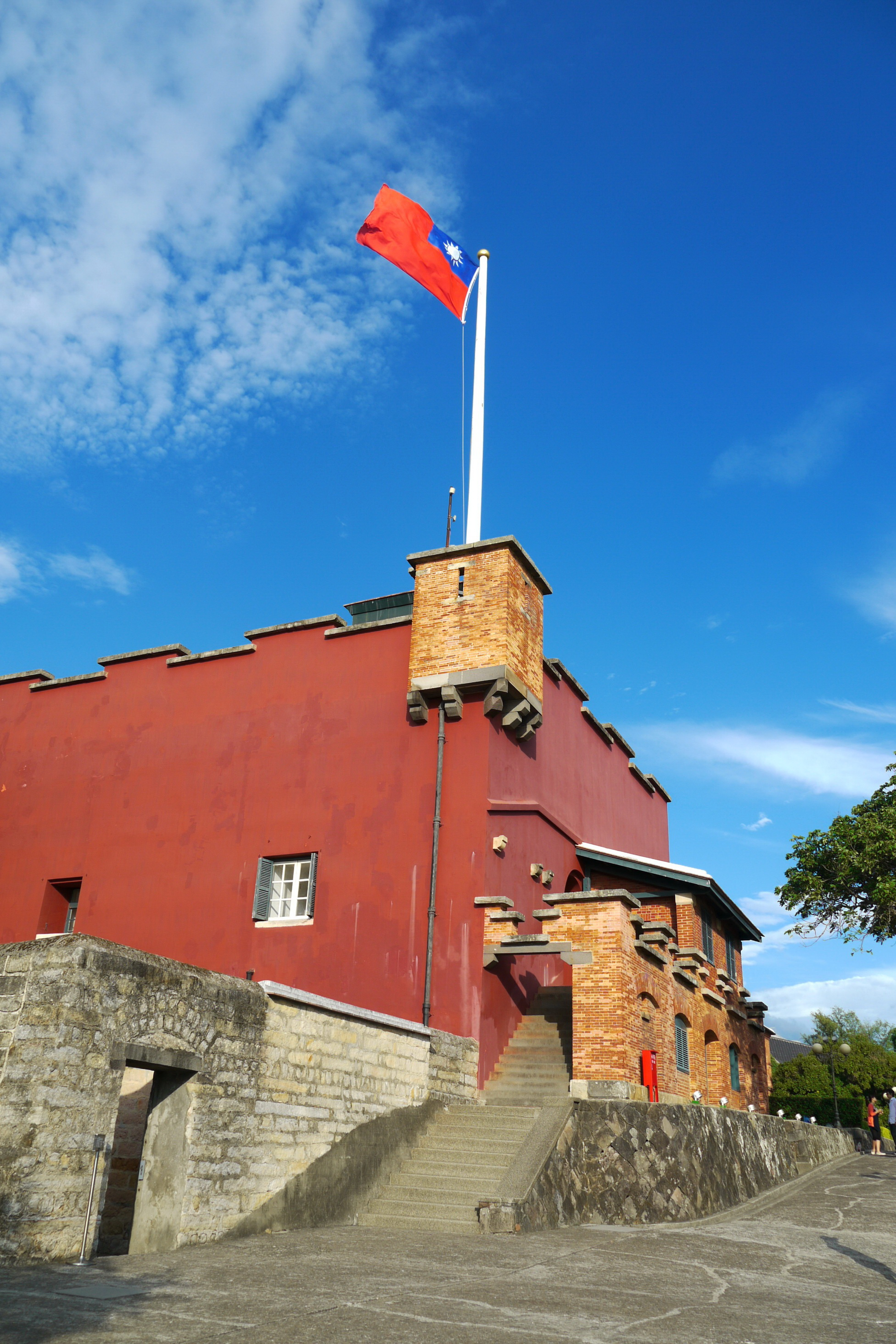 中華民國國旗飄揚紅毛城。